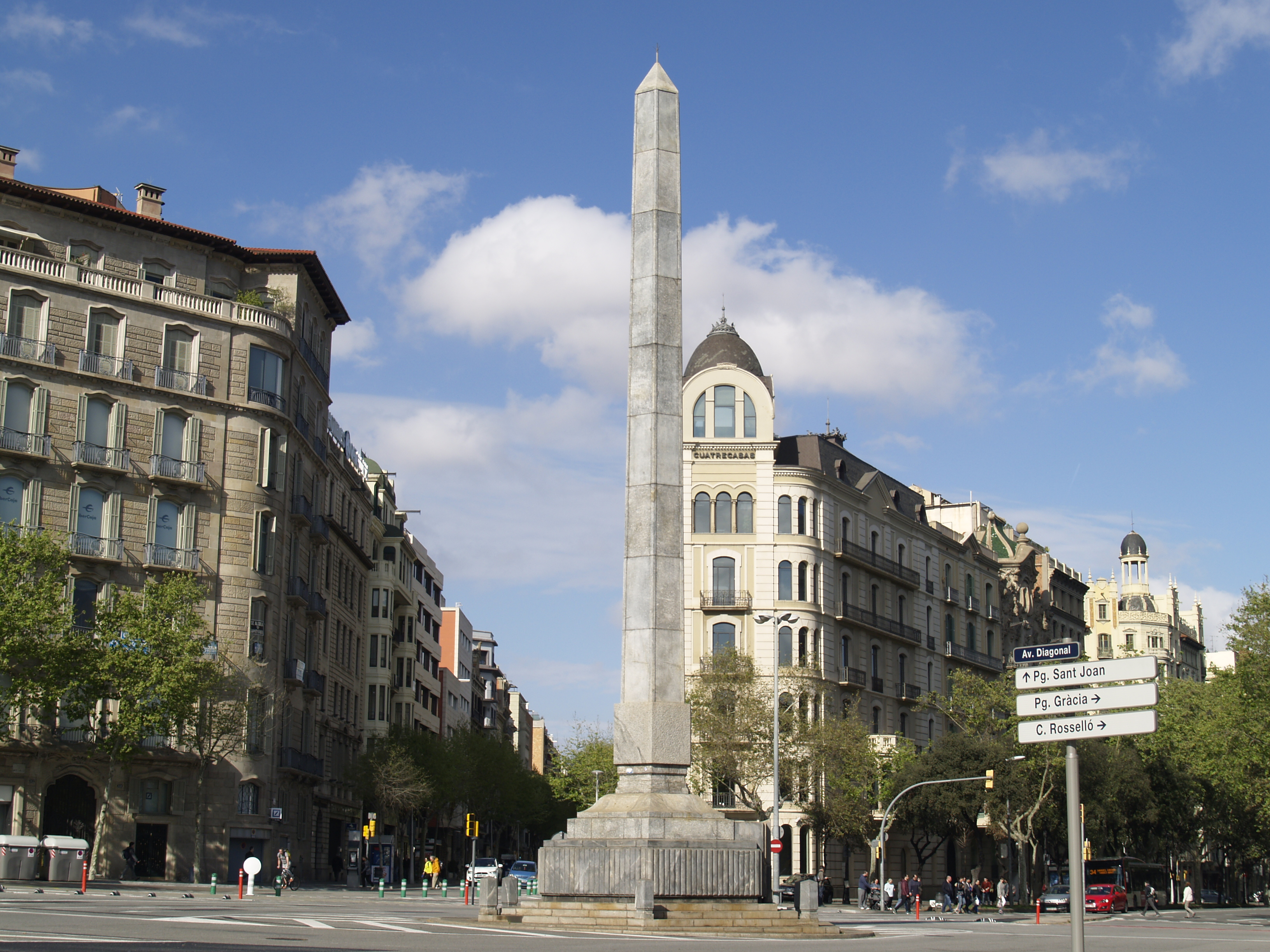 {nombre }